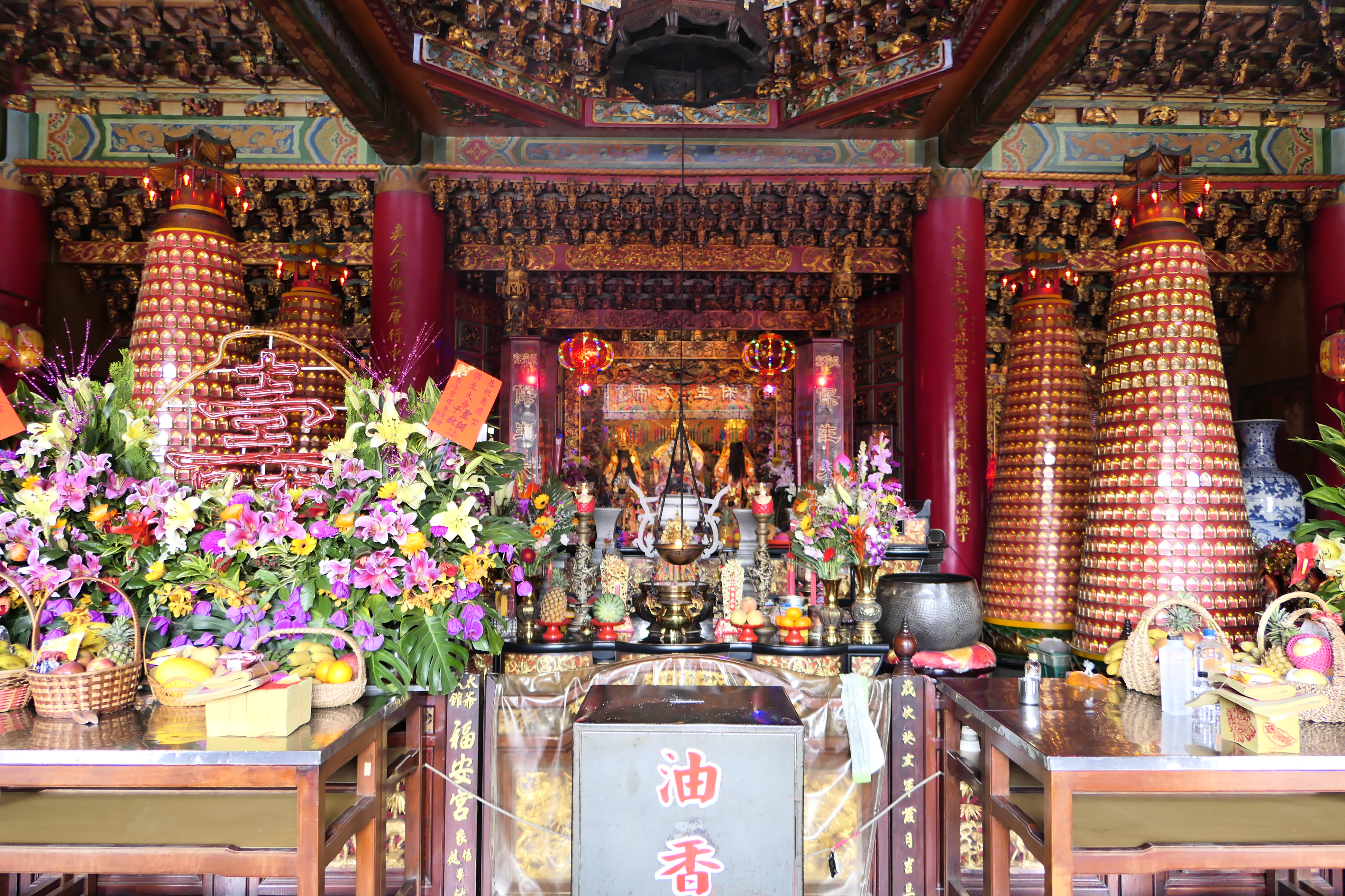 月眉池慈濟宫正殿